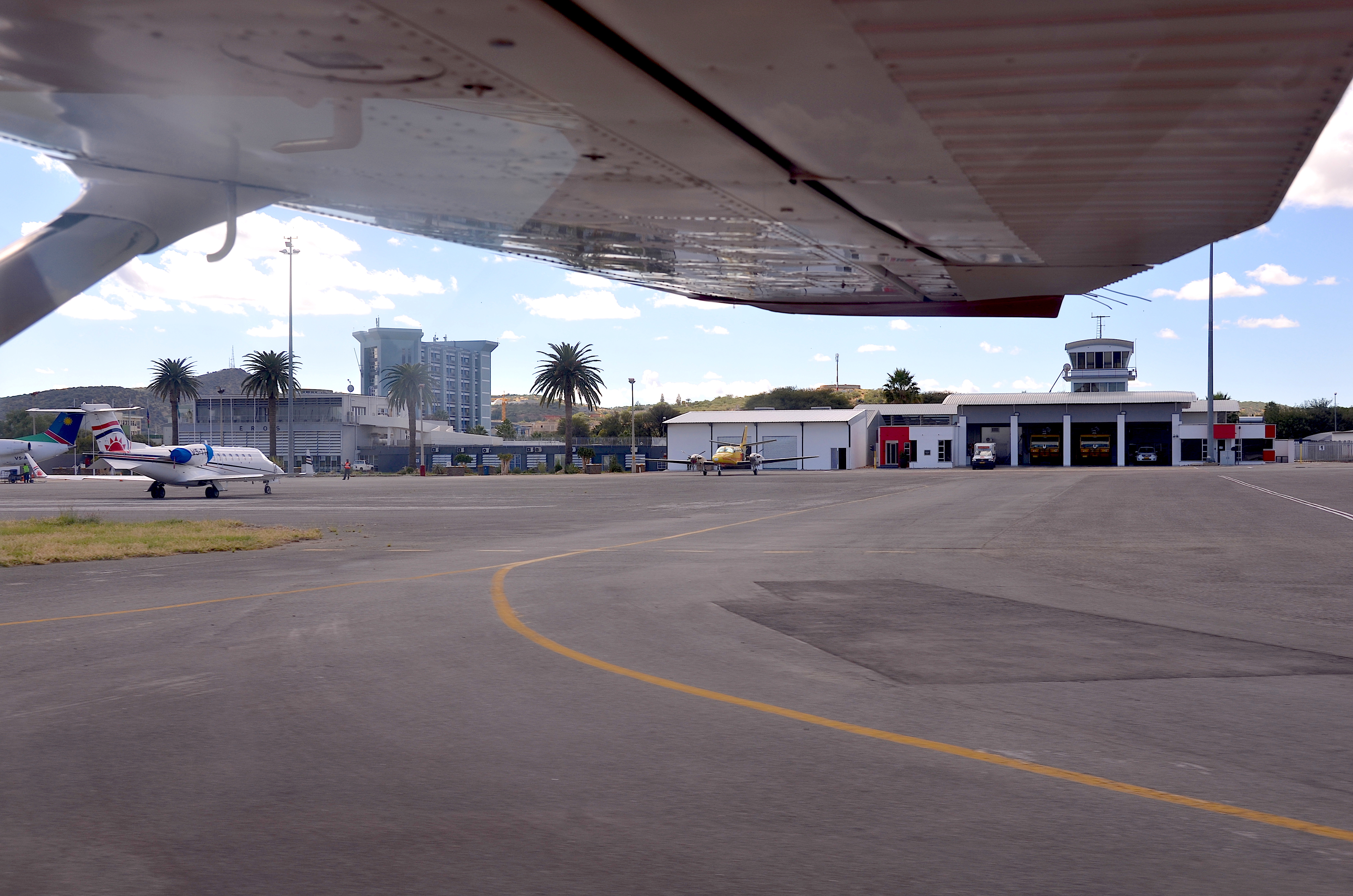 Flughafen Eros in Windhoek, Namibia (2017)